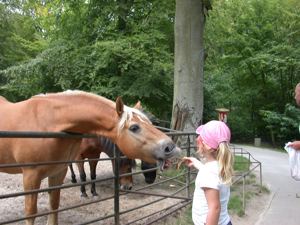 Mädchen füttert Pferd im Tierpark Sassnitz (Pferdegehege), Mädchen dem Fotografen bekannt